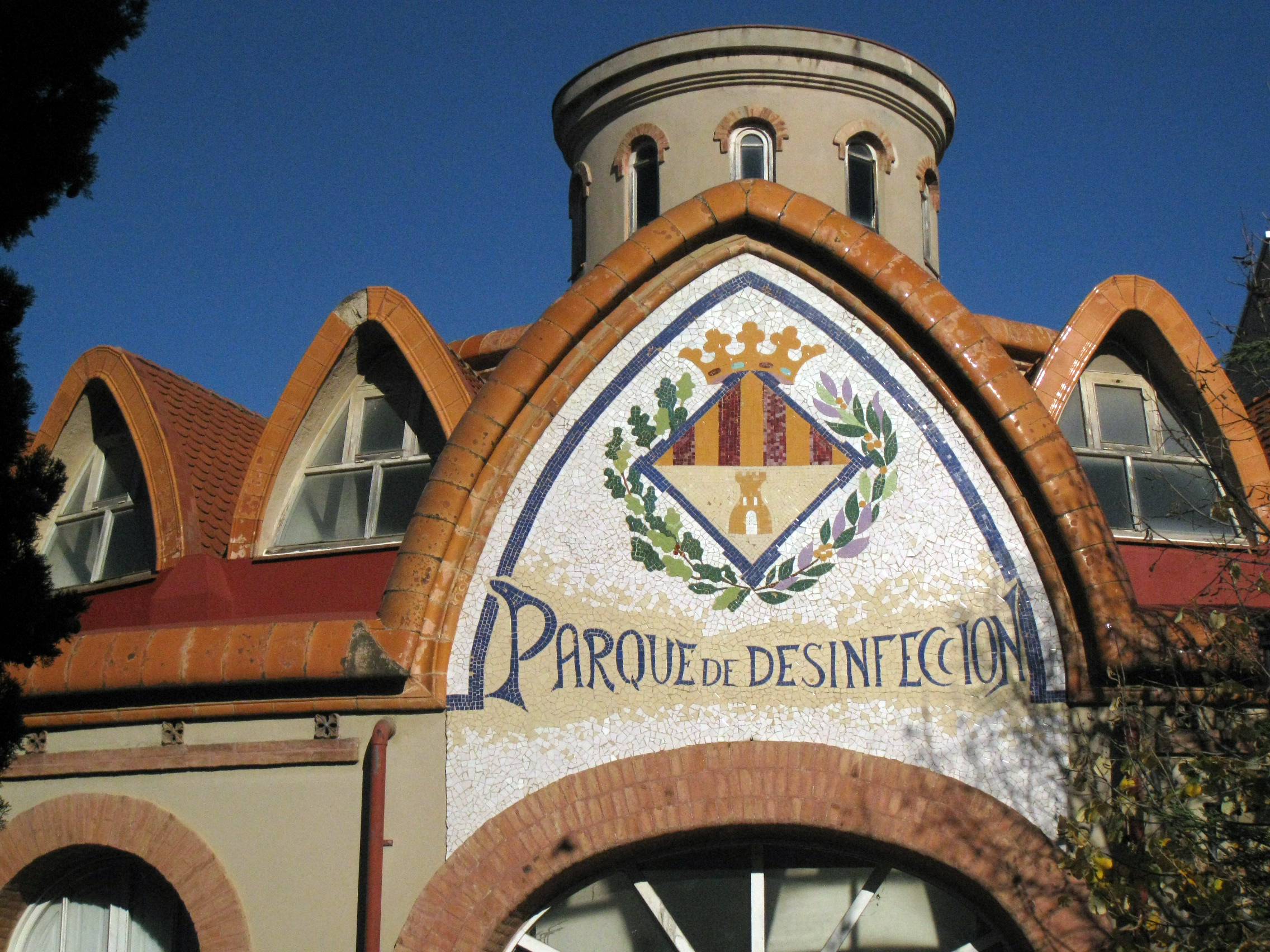 Parc de Desinfecció, de Josep Maria Coll i Bacardí (1915), a Terrassa.